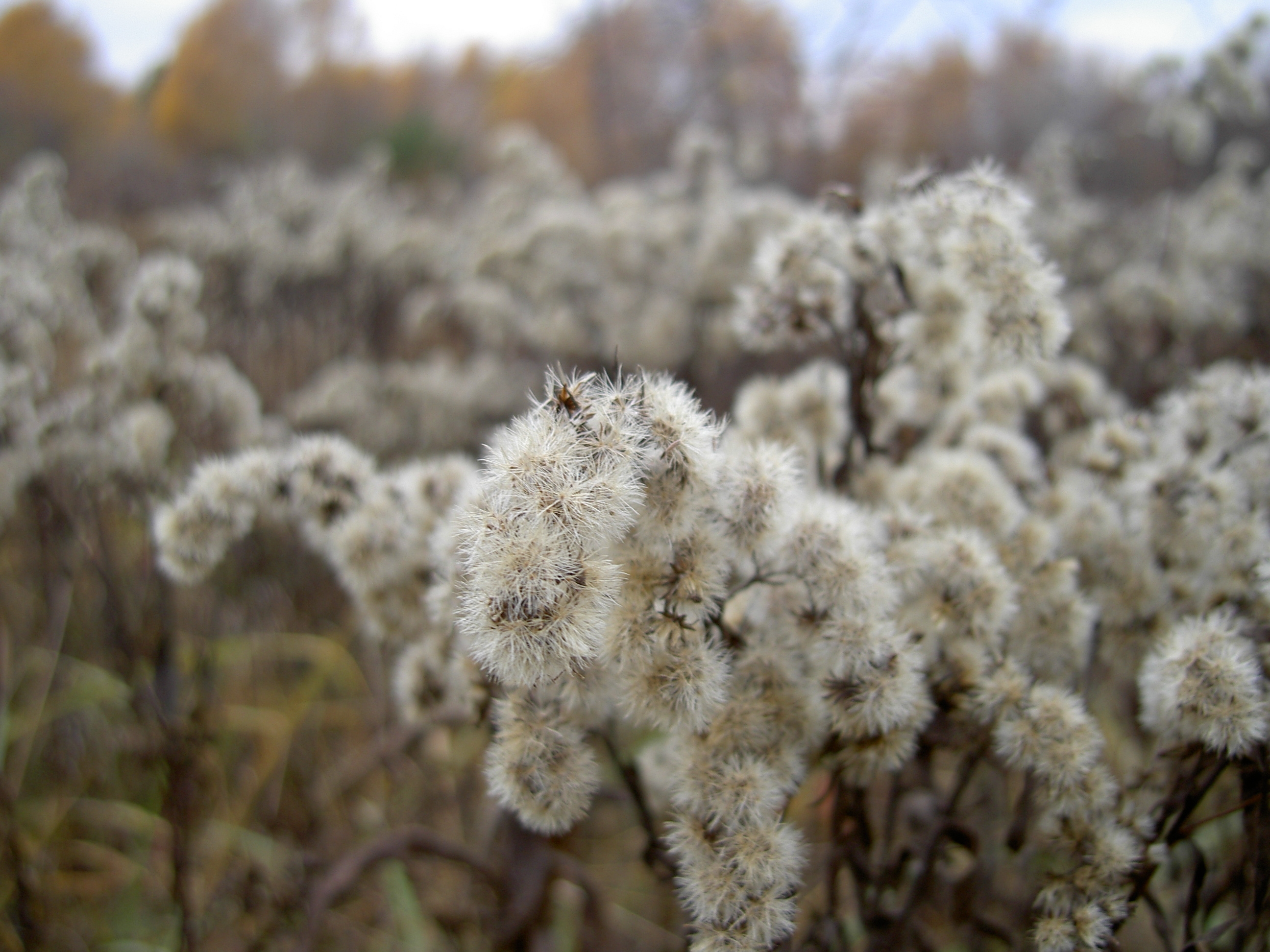 Kanadische Goldrute, Biesenhorster Sand im Dezember in Berlin